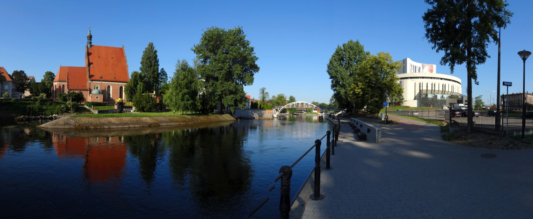 Bulwary nad Brdą oraz katedra p.w. św. Marcina i Mikołaja w Bydgoszczy (XIV-XV wiek)